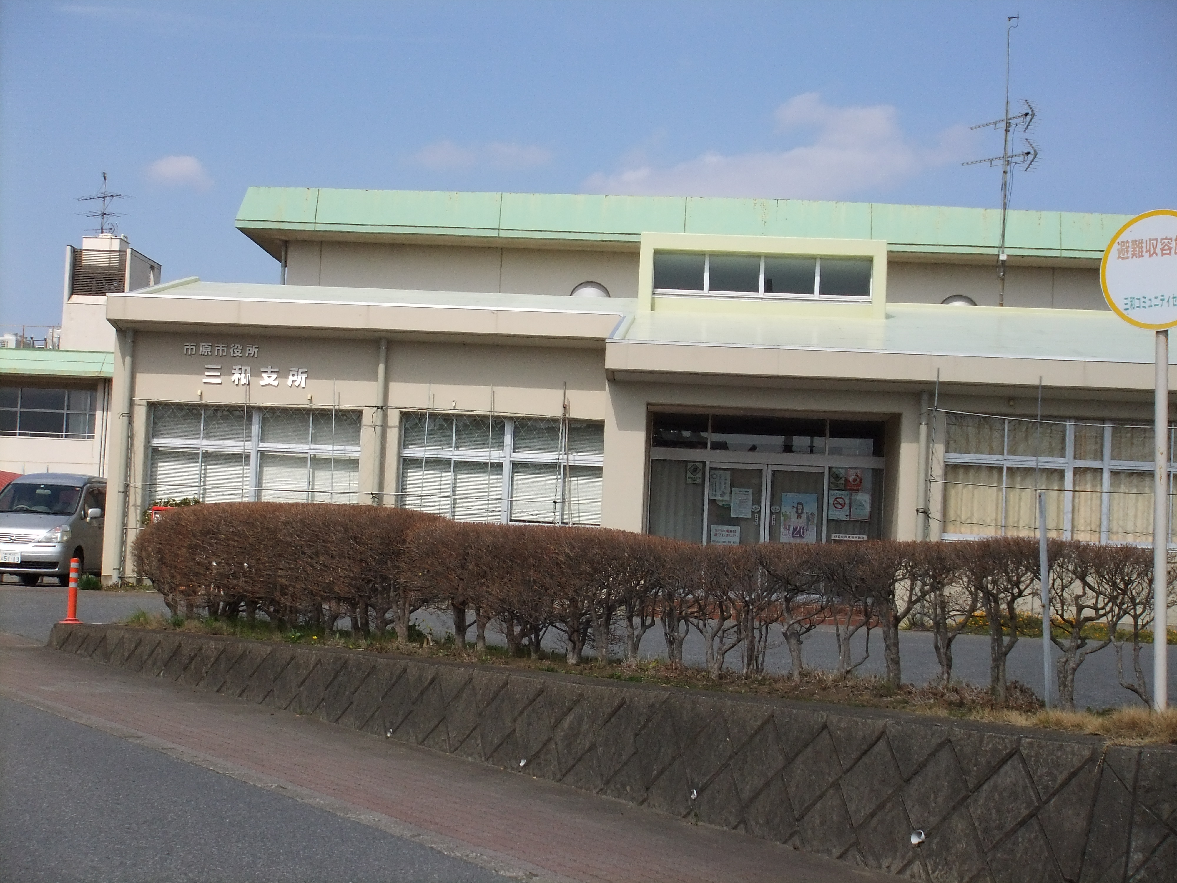 市原市役所の三和支所(2017年3月12日撮影)